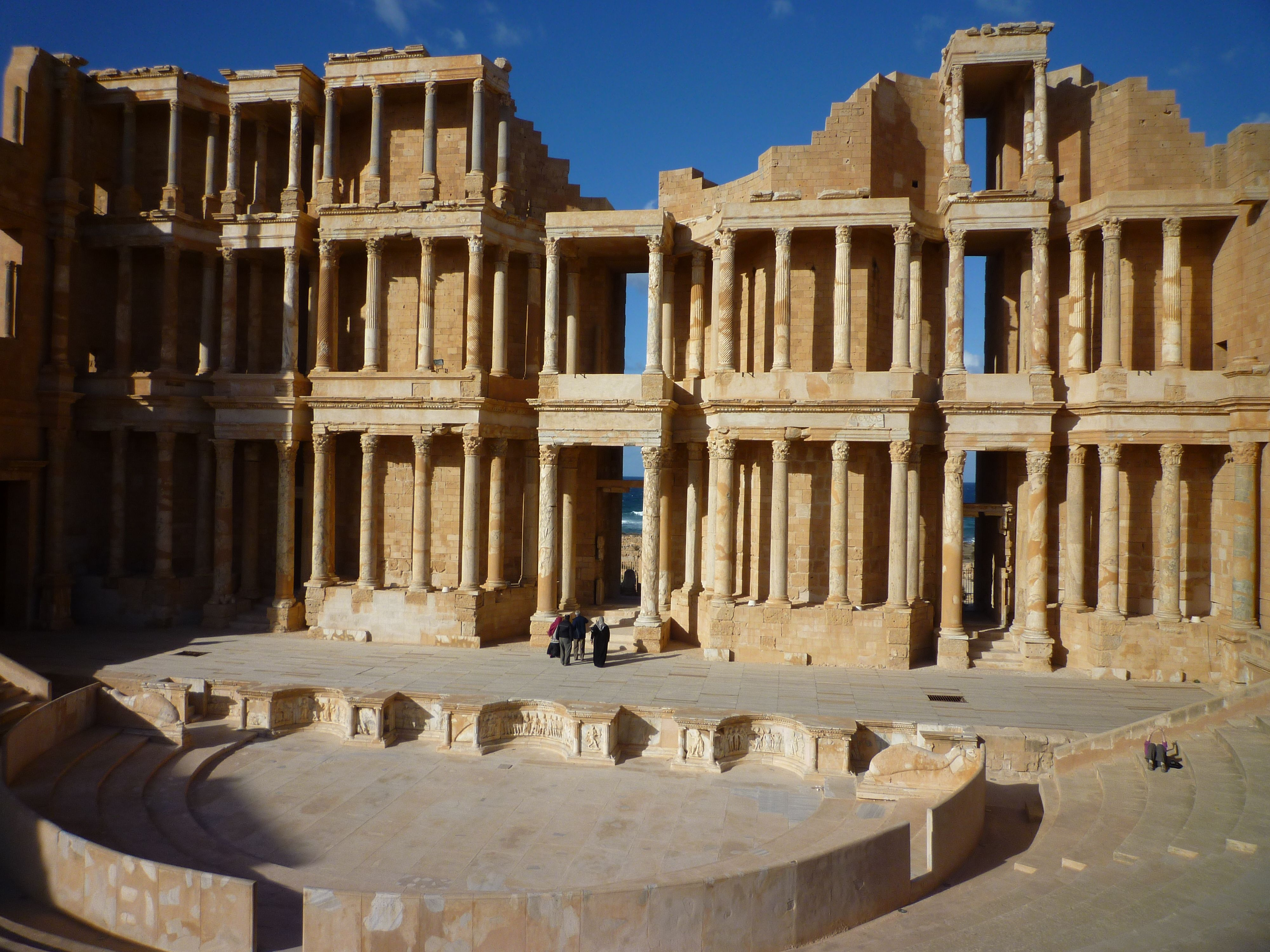 Sabratha-Bühnenhaus des Theaters 2. Jh